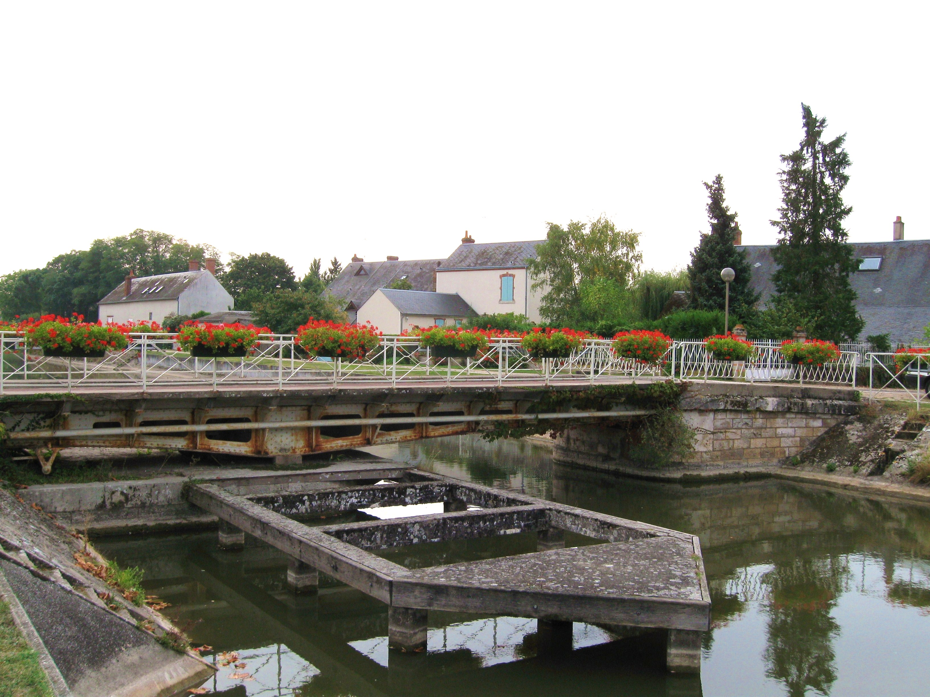 Le pont tournant (non fonctionnel) sur le canal d'Orléans, Combleux, Loiret, France